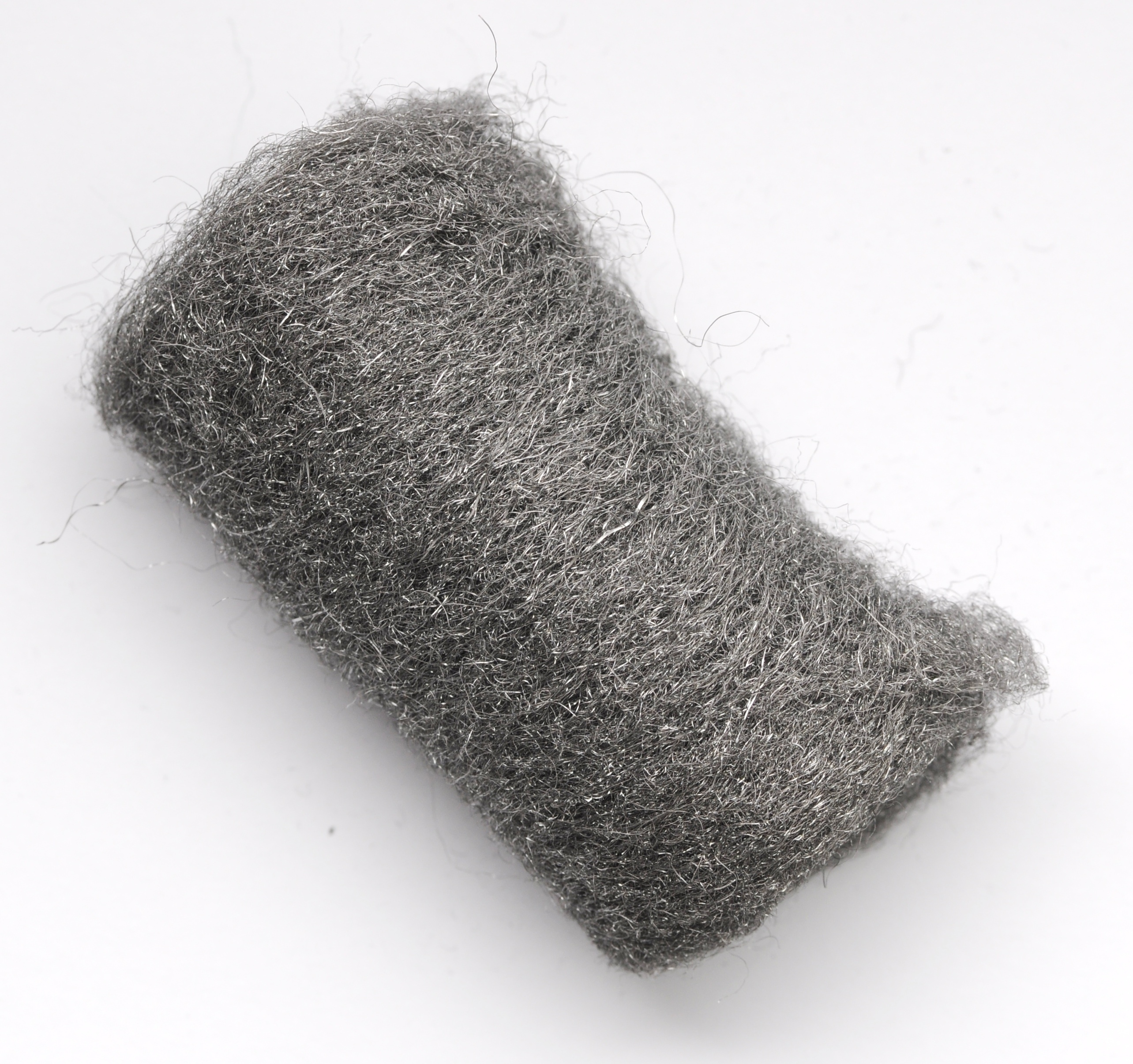 Steel wool.